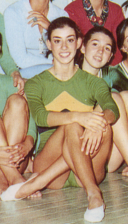 María Jesús Alegre con la selección nacional de gimnasia rítmica en 1975.